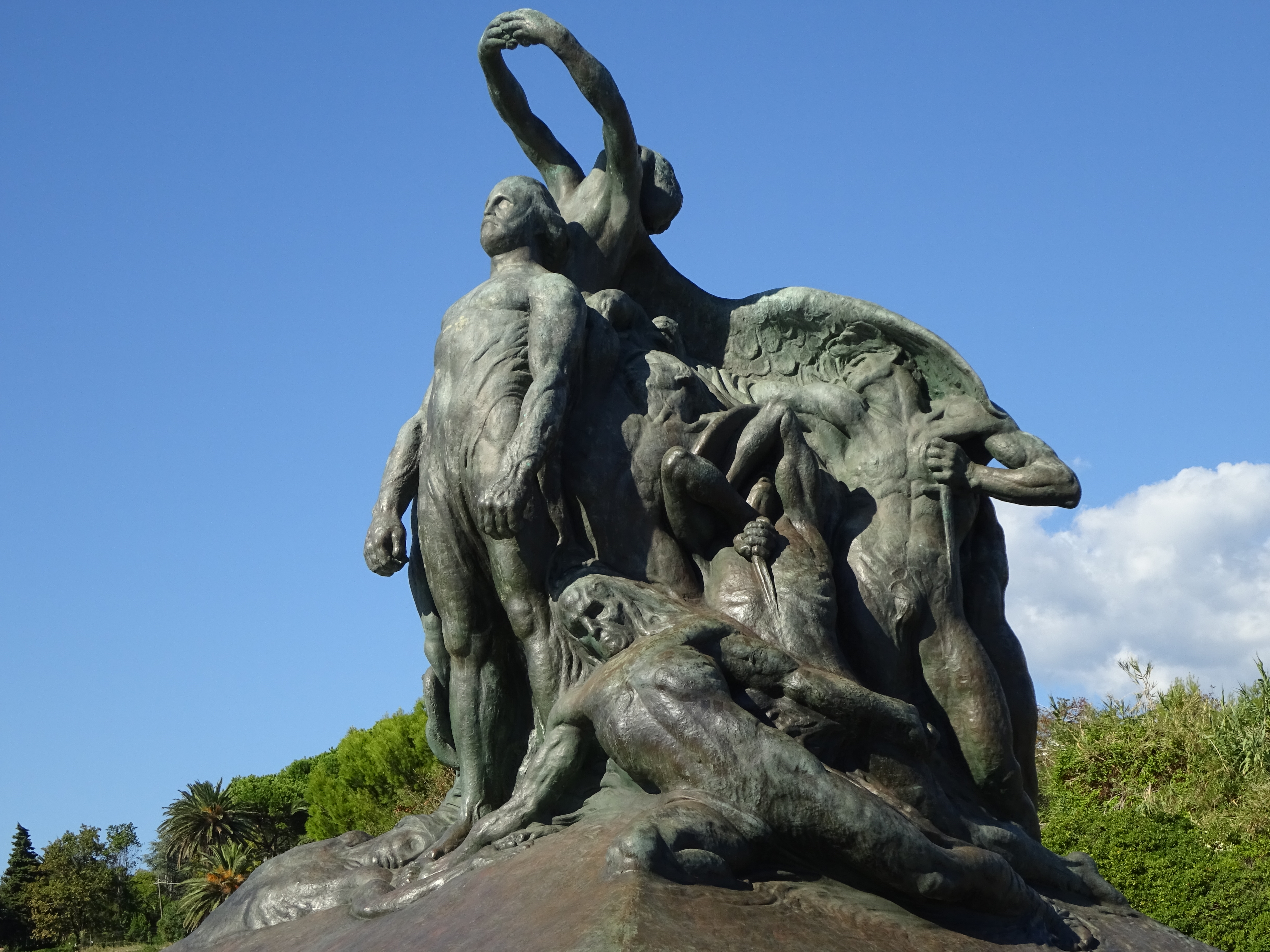 Monumento ai Mille This is a photo of a monument which is part of cultural heritage of Italy.